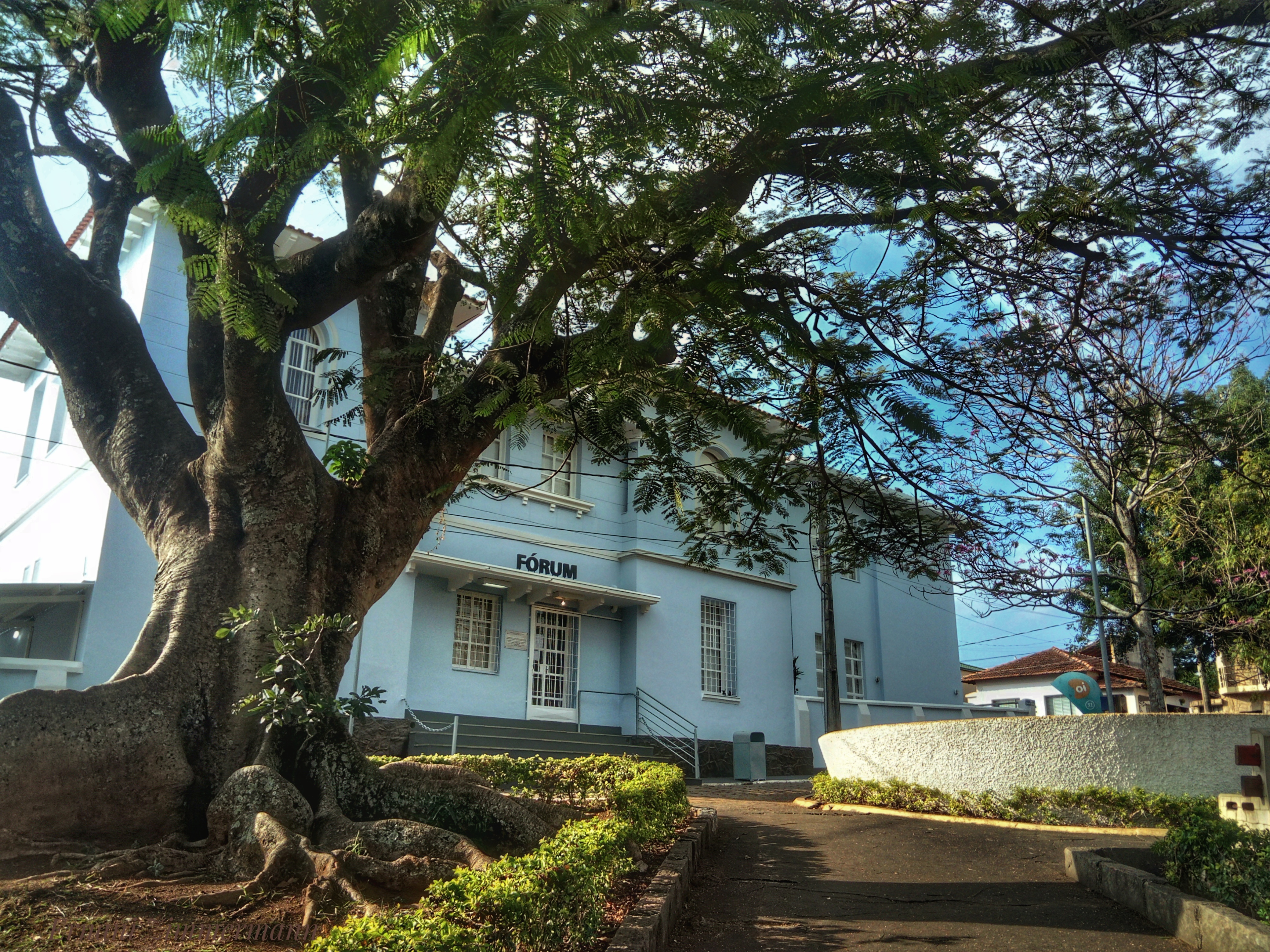 Sede da comarca do município de Botelhos, Minas Gerais.